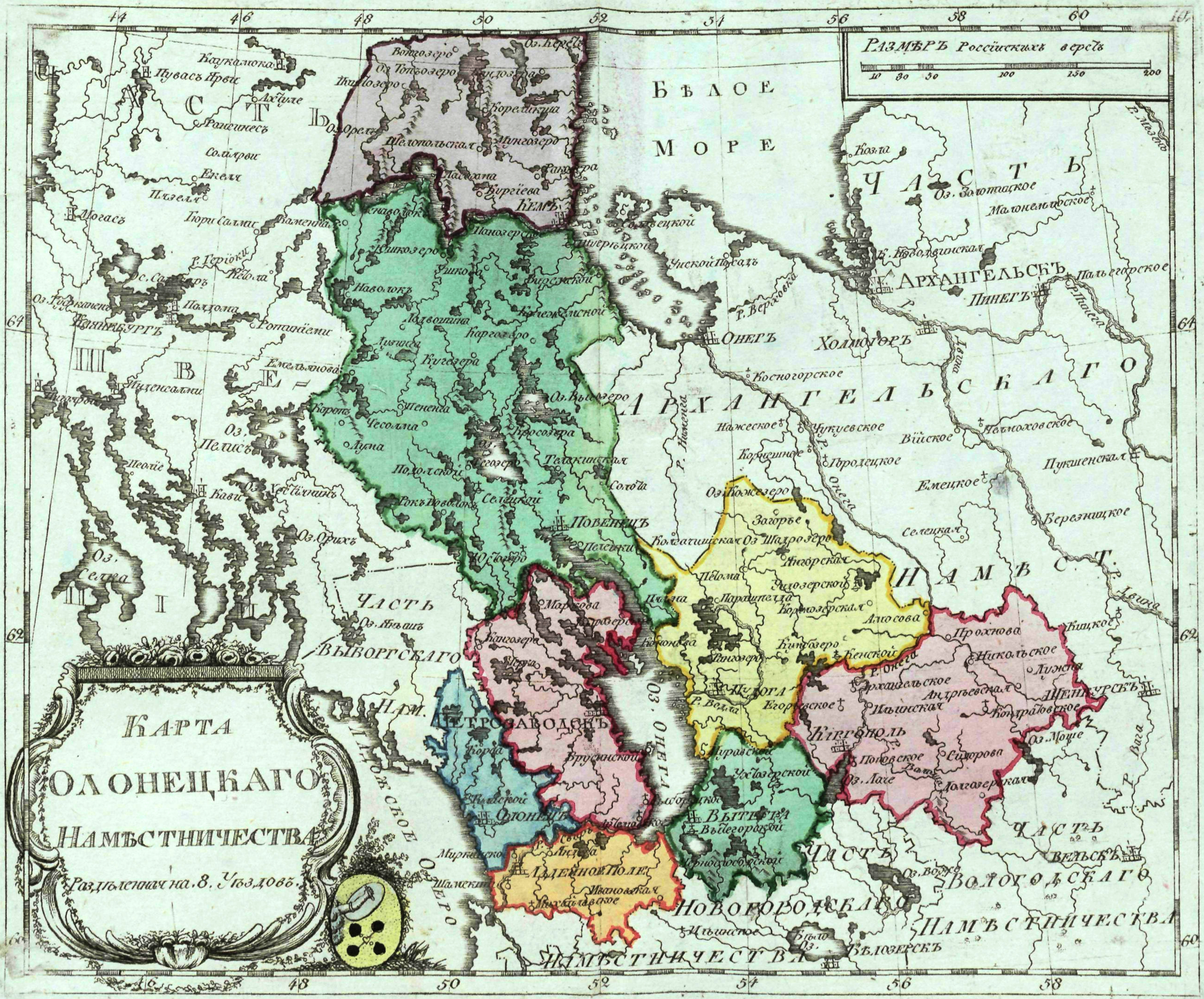 Карта Олонецкого наместничества из атласа 1796 г. - "Атлас Российской империи, Состоящий из 52 карт, Изданный во граде С. Петра в лето 1796 года, а Царствования Екатерины II "